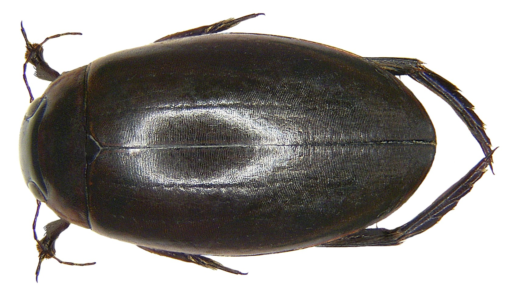 Colymbetes fuscus (Linné, 1758) Familie: Dytiscidae Grösse: 16 mm Verbreitung: Europa Fundort: Germania, Bayern, Deggendorf leg.det.U.Schmidt, 1978 Foto: U.Schmidt, 2008